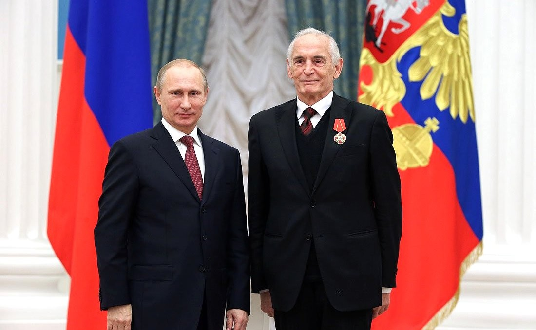 На церемонии вручения государственных наград Российской Федерации. Актёр Василий Лановой награждён орденом Александра Невского.